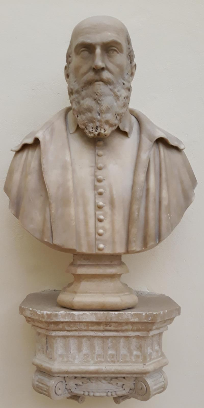 Busto di Michele Sanmicheli